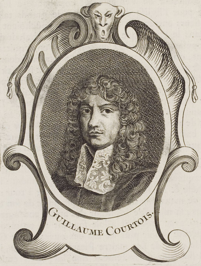 Portrait des Malers Guillaume Courtois